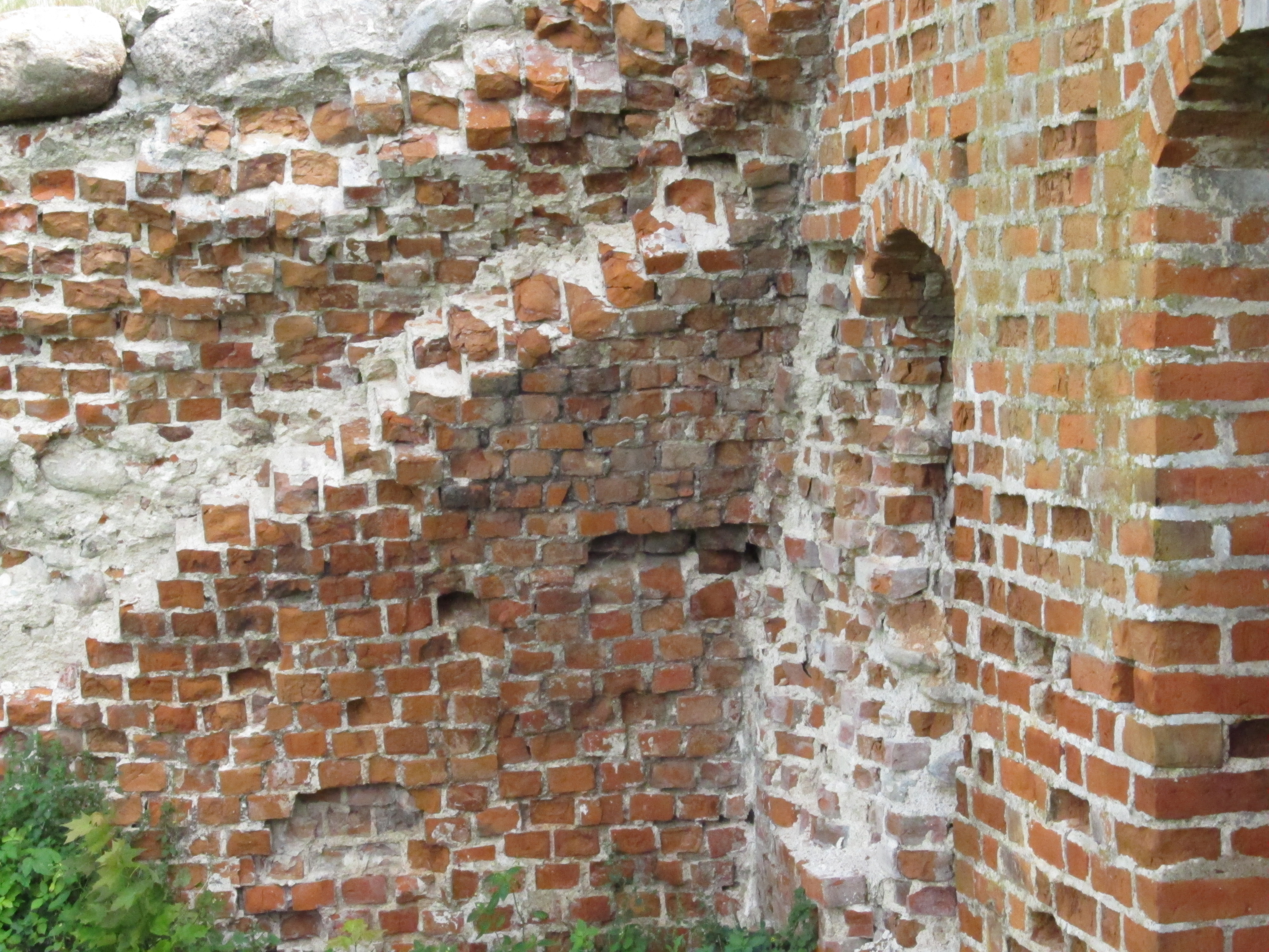 Беларуская (тарашкевіца): Комплекс Старога замка:палацфрагмэнт абарончых сьценНіжняя царква (руіны)Верхняя царква (рэшткі)княжацкі хорам (руіны)мостзамчышча. г. Горадня This is a photo of Belarusian heritage monument. Reference number: 411Г000003 ( WLM)